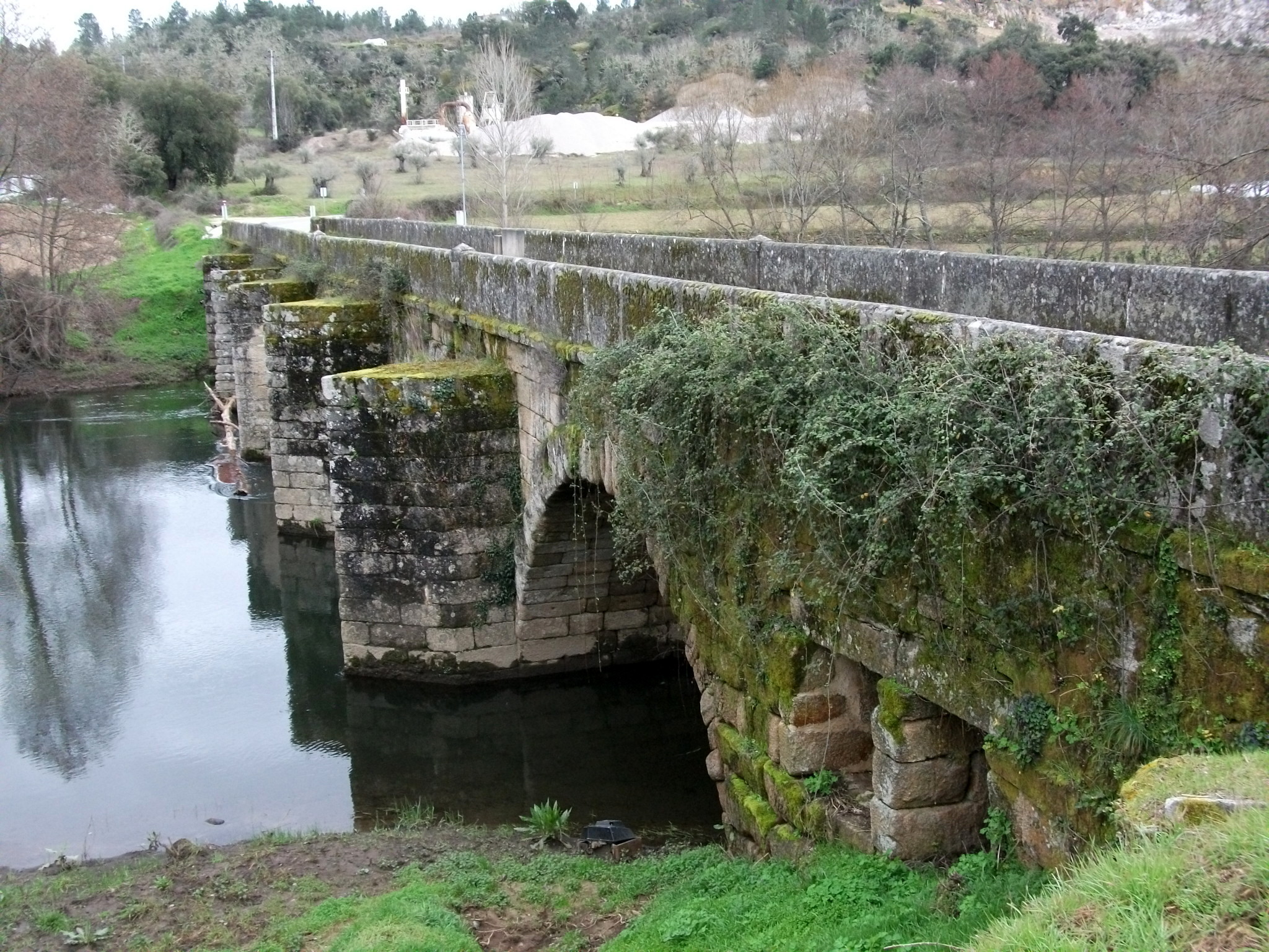 Vista de montante da margem direita topo da "Ponte de pedra sobre o rio Tuela", também referida como "Ponte Românica sobre o rio Tuela" ou "Ponte de Torre de Dona Chama", na Estrada Nacional 206 em Torre de Dona Chama, Portugal.